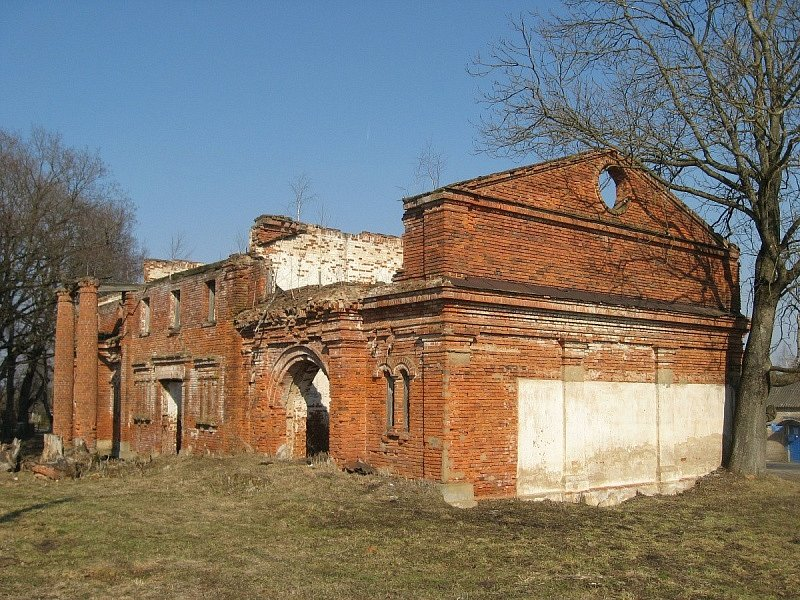 Вялікія Навасёлкі. Сядзіба Кастравіцкіх. Стайні